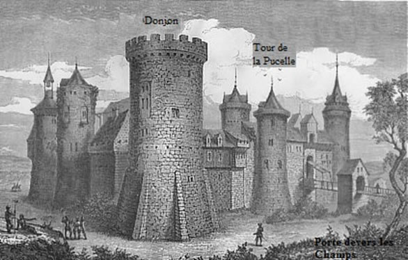 Gravure du château tel qu’il devait être en 1525. D’après Jacques Le Lieur.